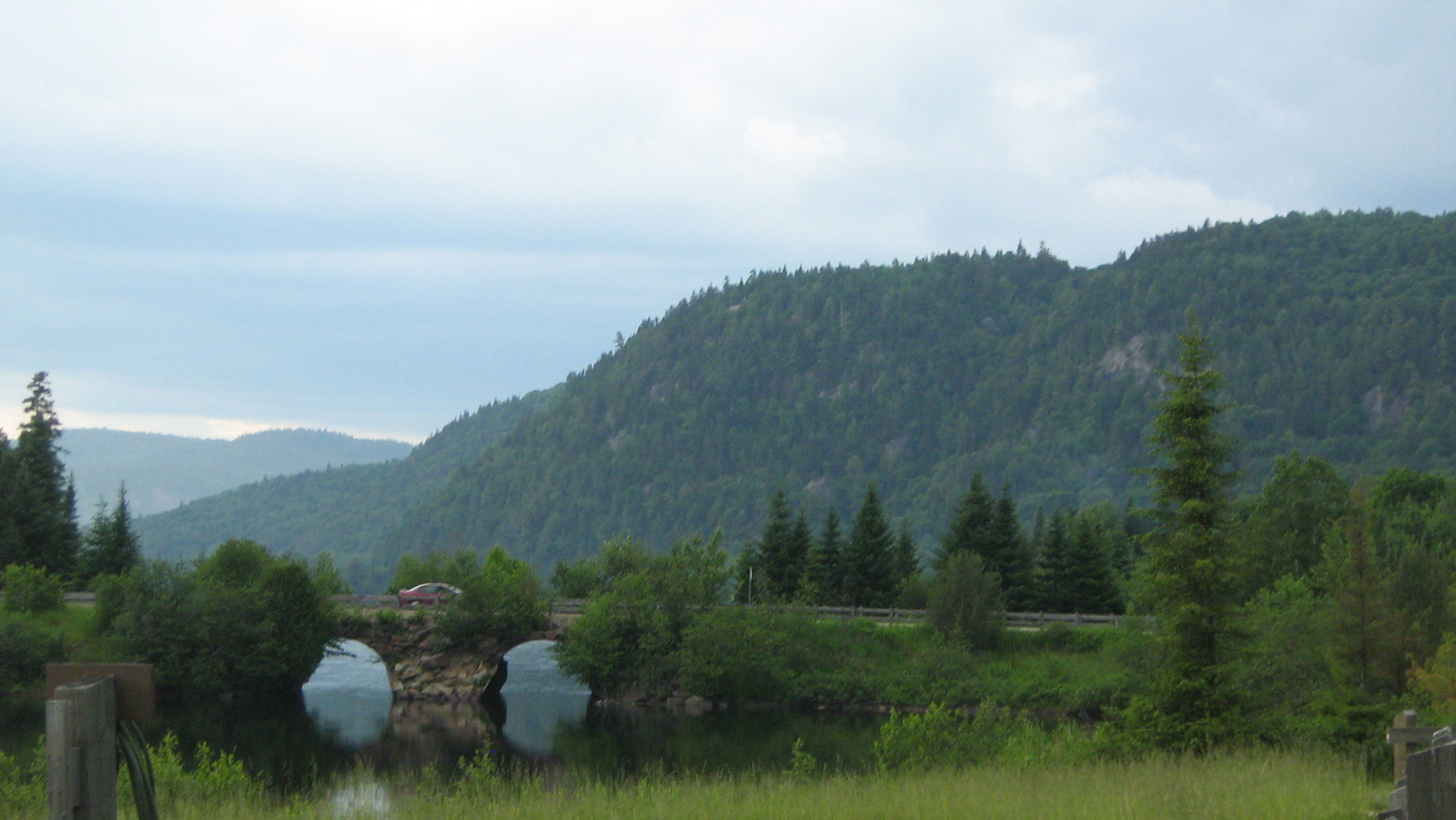 Paysage du lac Monroe dans le parc national du Mont-Tremblant